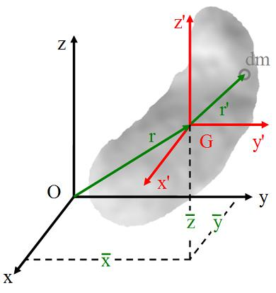 平行軸定理